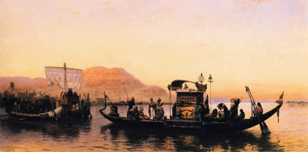 Frederick Arhur Bridgman : Les funérailles de la momie (1877)